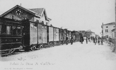 Strà di Caldiero - Convoglio tranviario